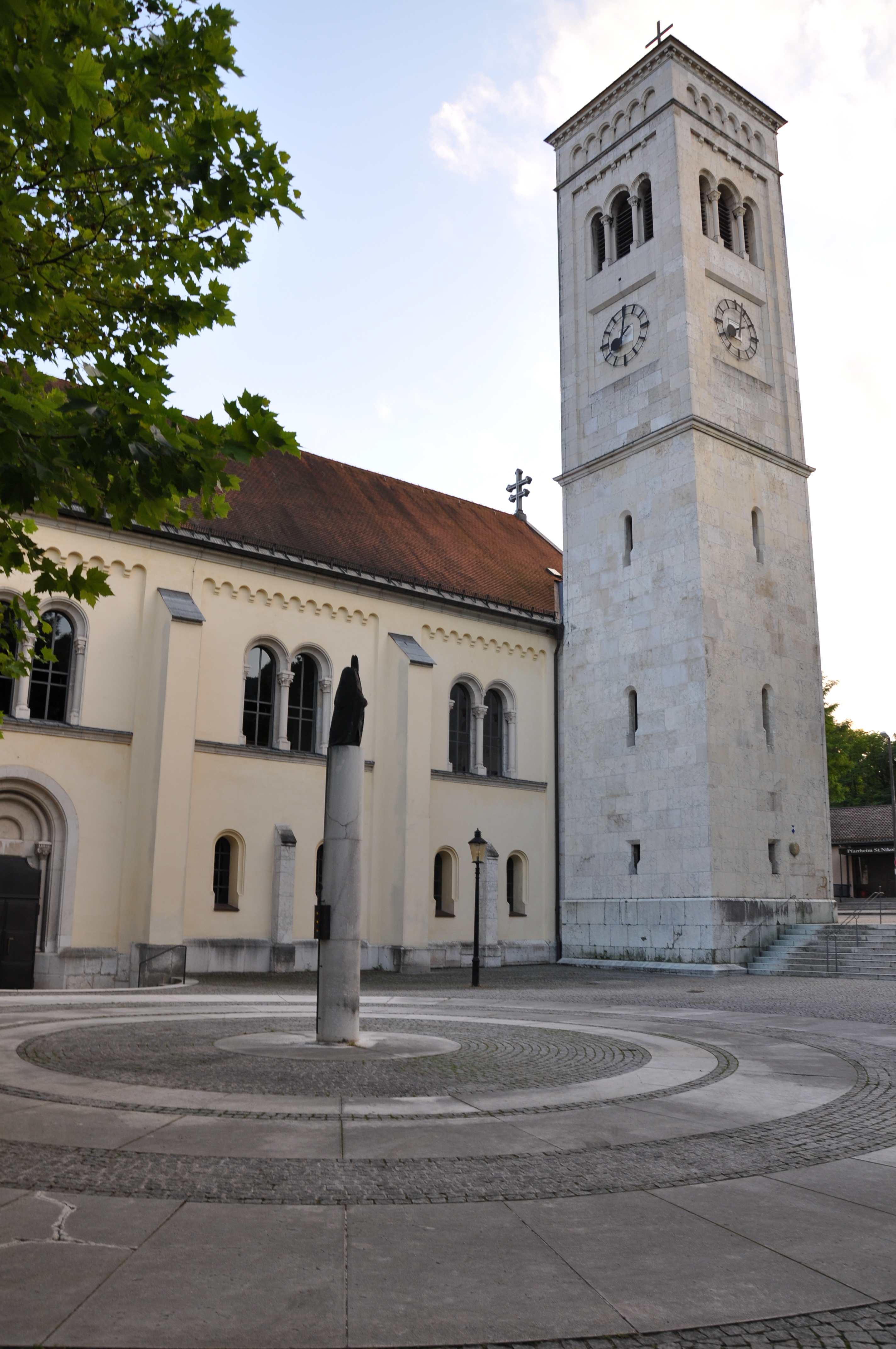 Pfarrkirche und Kirchenplatz St. Nikolaus in Bad Reichenhall Ganz rechts im Hintergrund ist ein Teil des Pfarrheims zu sehen Bei Verwendung bitte ich hier um einen Hinweis, wo das Foto genutzt wird.